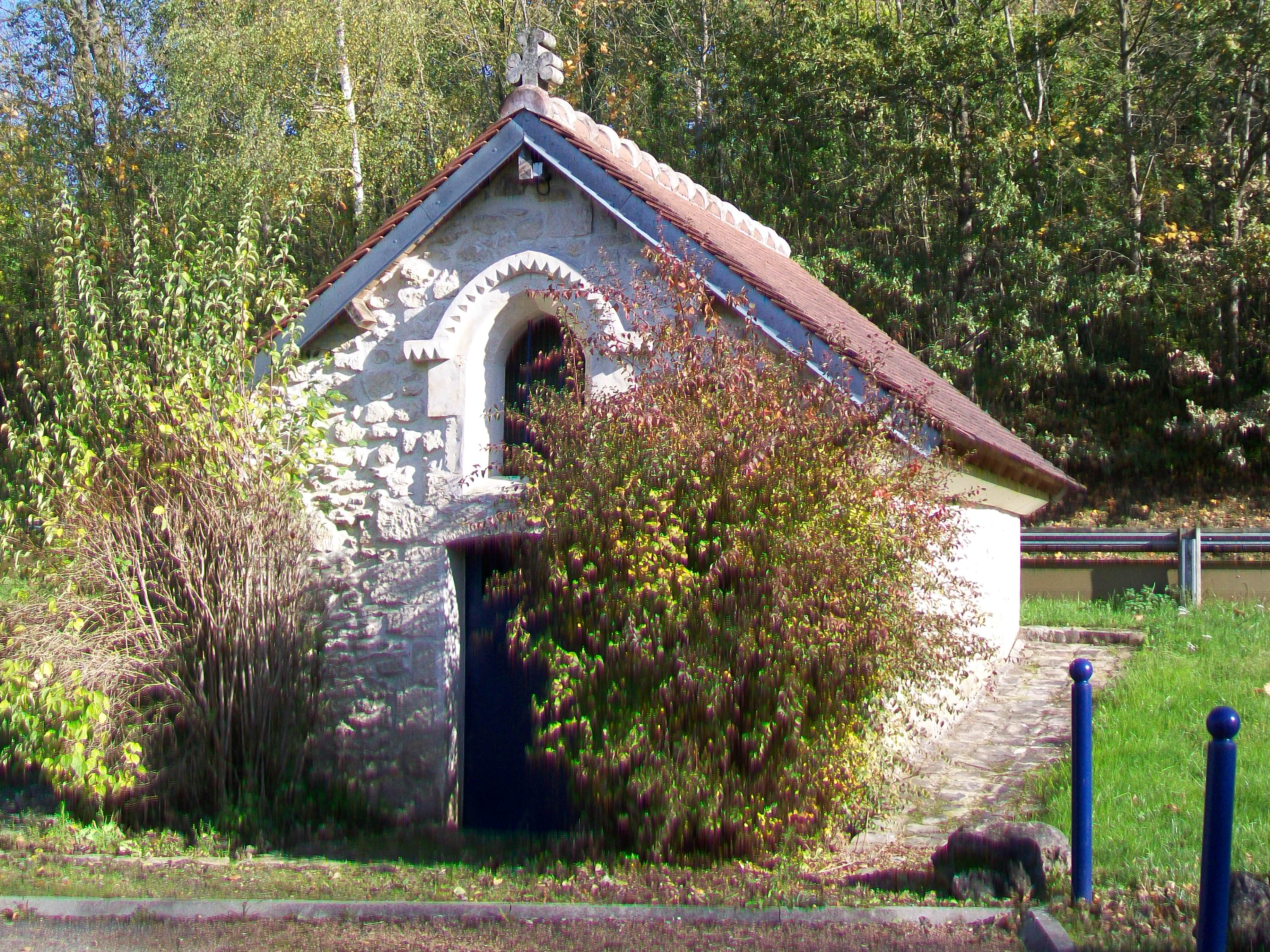 La petite chapelle Saint-Antoine-de-Padoue à l'entrée sud du village.